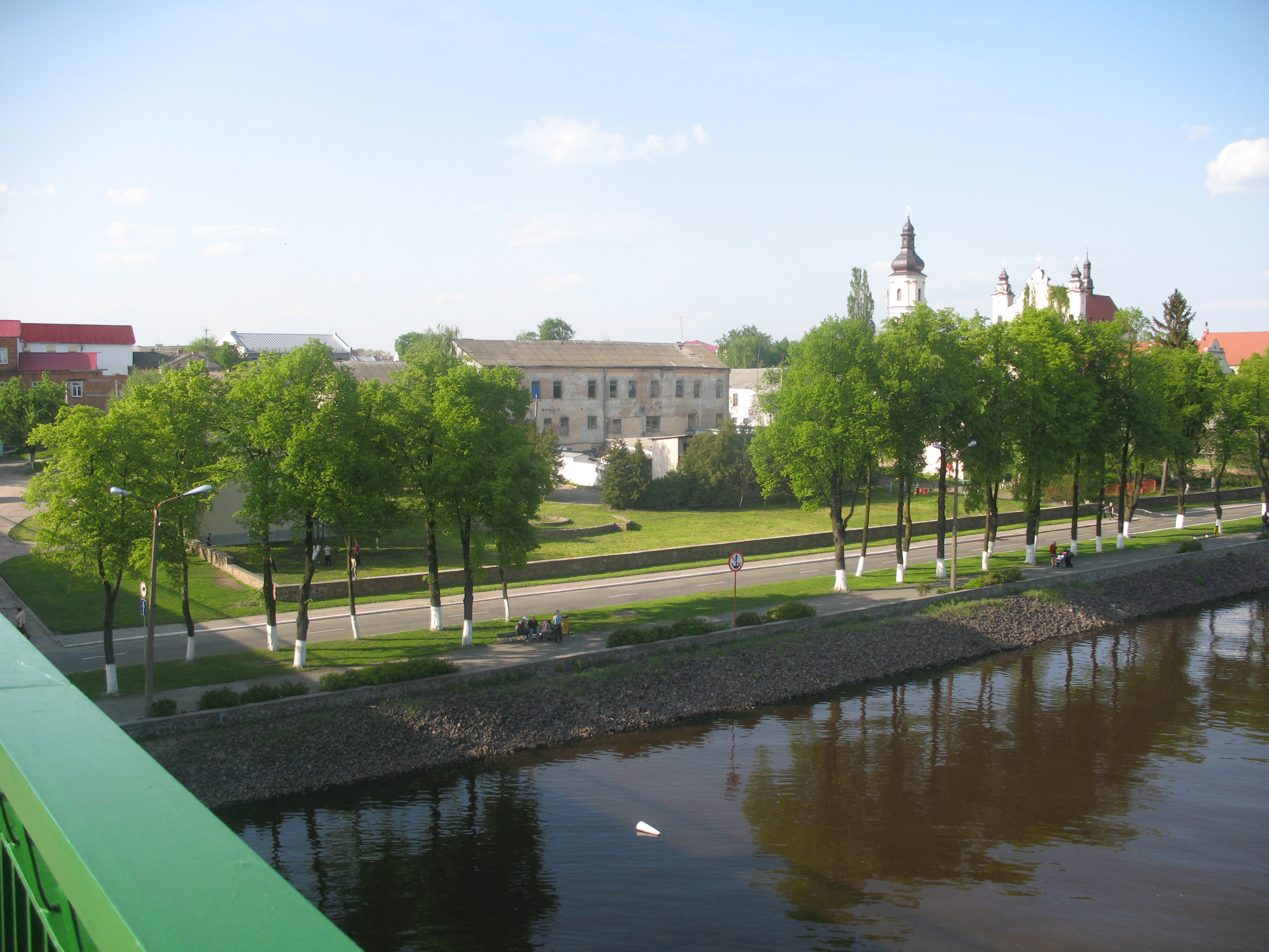 Pinsk, View from Pina river bridge